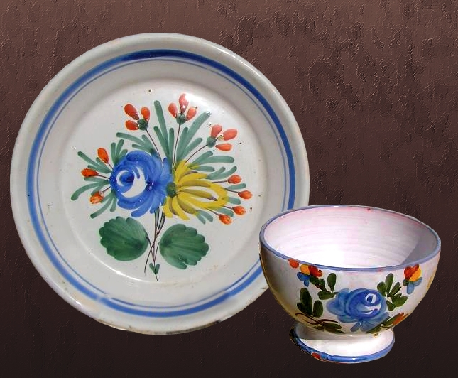 Faïence Charentaise décor traditionnel, assiette XIX°, bol actuel